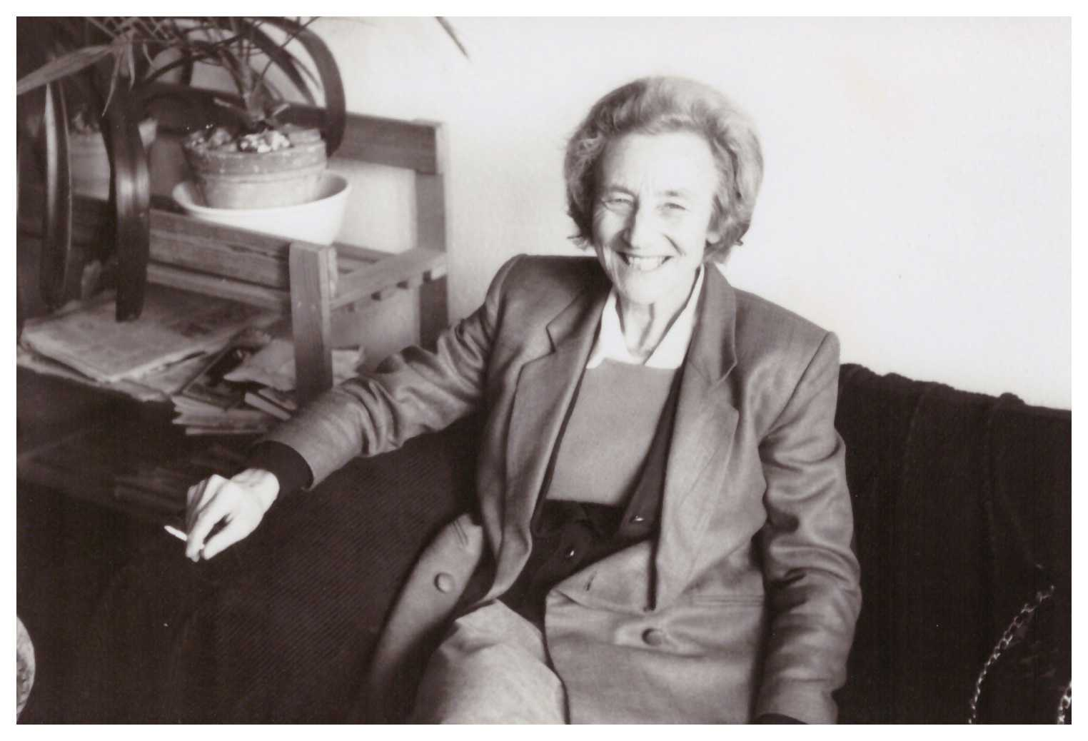 Erica Glaser-Wallach, 1991, bei Dreharbeiten mit Thomas Grimm und Werner Schweizer in Berlin